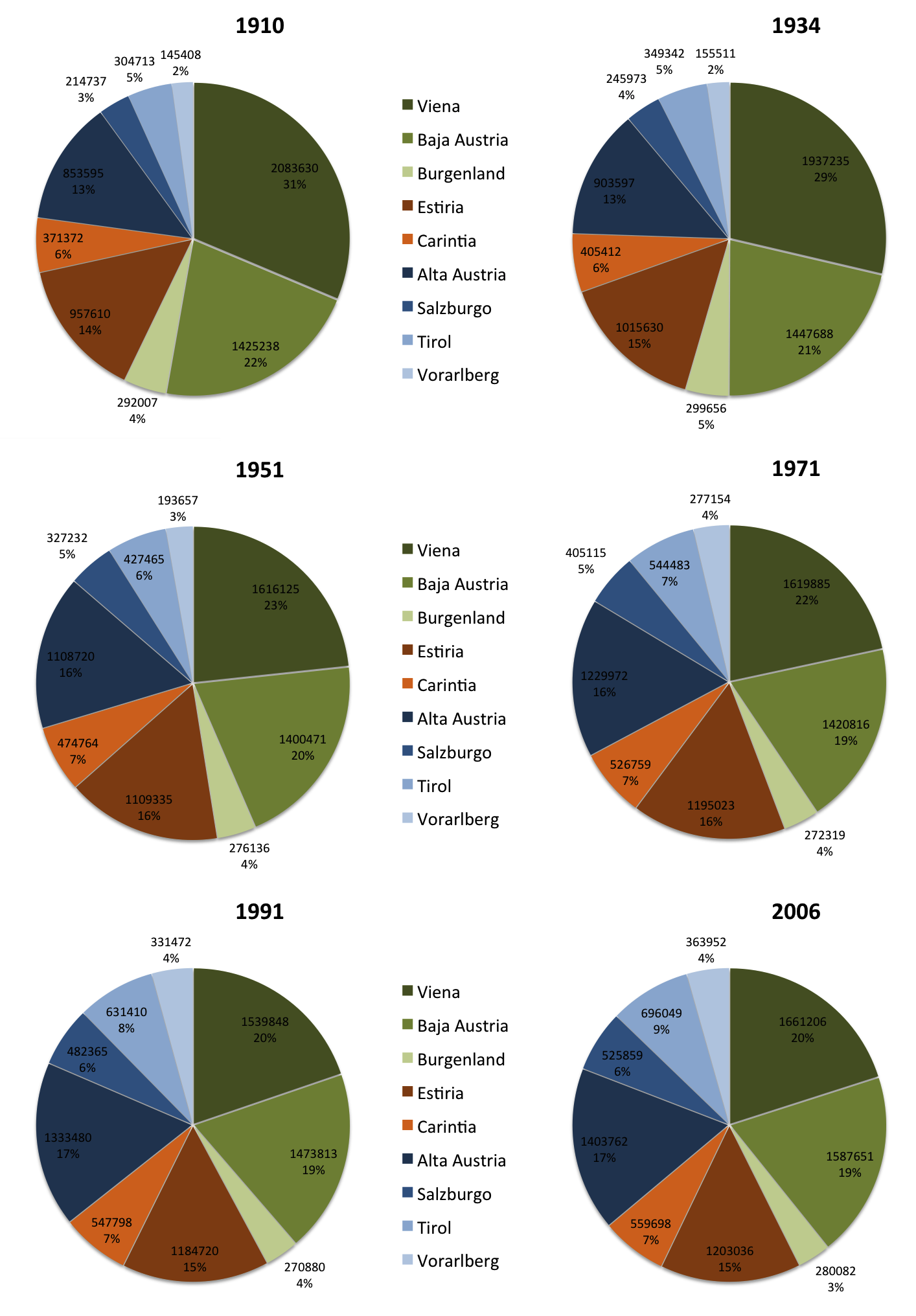 Distribución de la población de Austria entre sus actuales estados en diferentes censos.